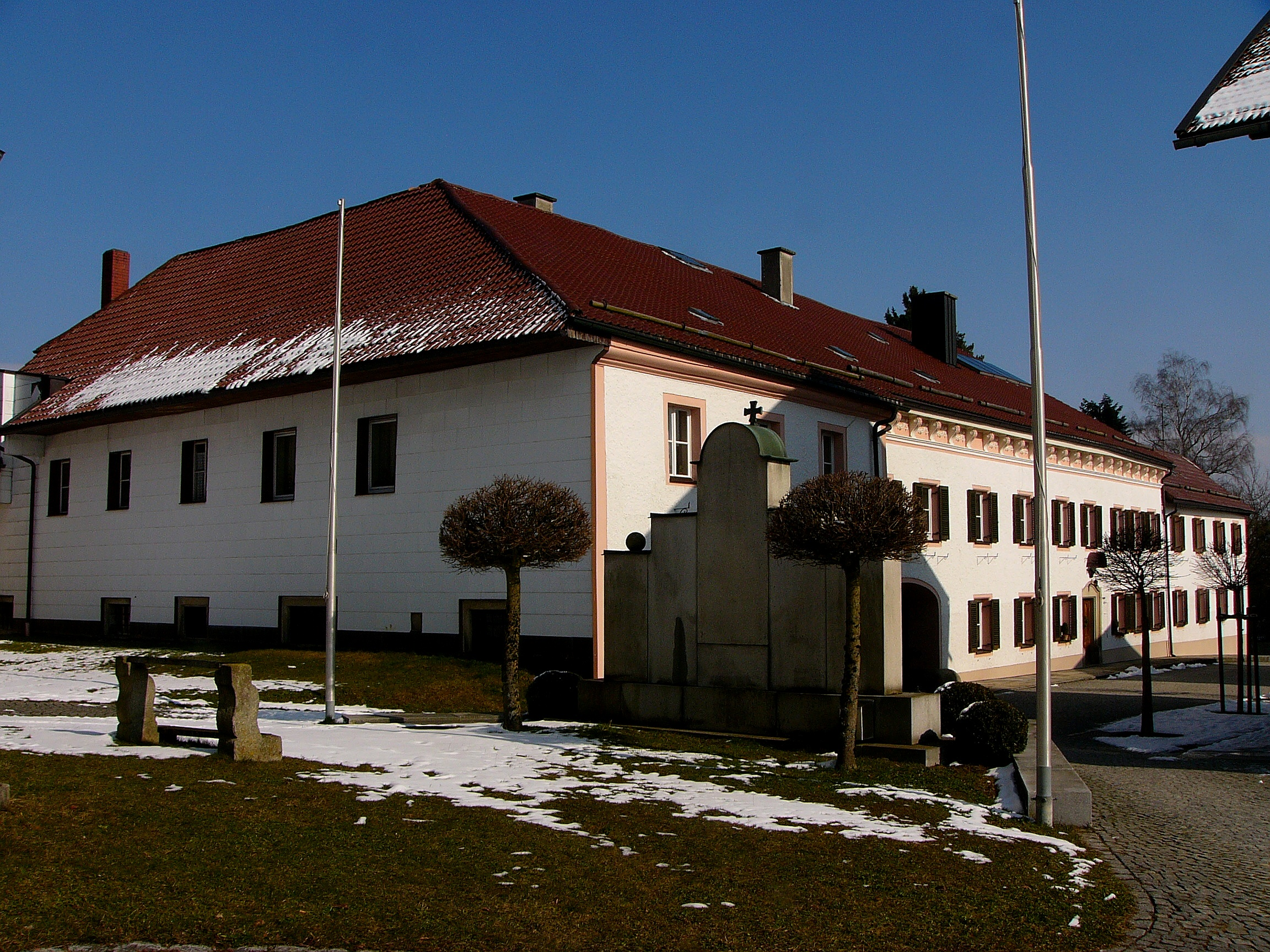 Ehem. fürstbischöflicher Gutshof und Brauerei, stattliche Anlage um Innenhof; zweigeschossiges Wohn- und Gasthaus, bez. 1720 (Wappenstein), Umbau und Neugestaltung der Fassade mit reich geschmücktem Kranzgesims, wohl 1833 (bez. in der Durchfahrt); ehem. Stall, bez. 1833; Stadel, 2. Viertel 19. Jahrhundert; ehem. Pferdestall, Ende 19. Jahrhundert, Südwand mit Teilen der ehem. Friedhofsmauer, wohl noch mittelalterlich; Bierlagerkeller, weit verzweigte Anlage, teilweise zweigeschossig, 18./19. Jahrhundert. This is a photograph of an architectural monument.